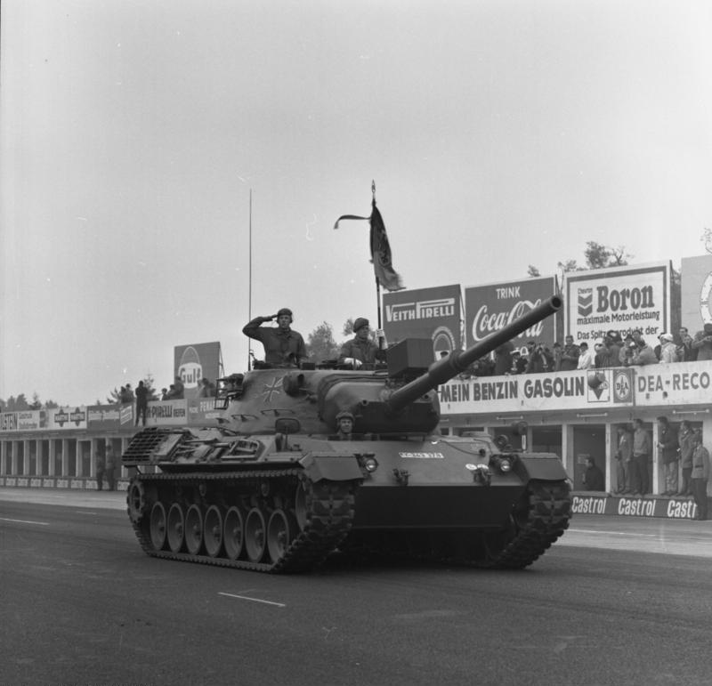 20 Jahre NATO. Bundeswehrparade auf dem Nürburgring